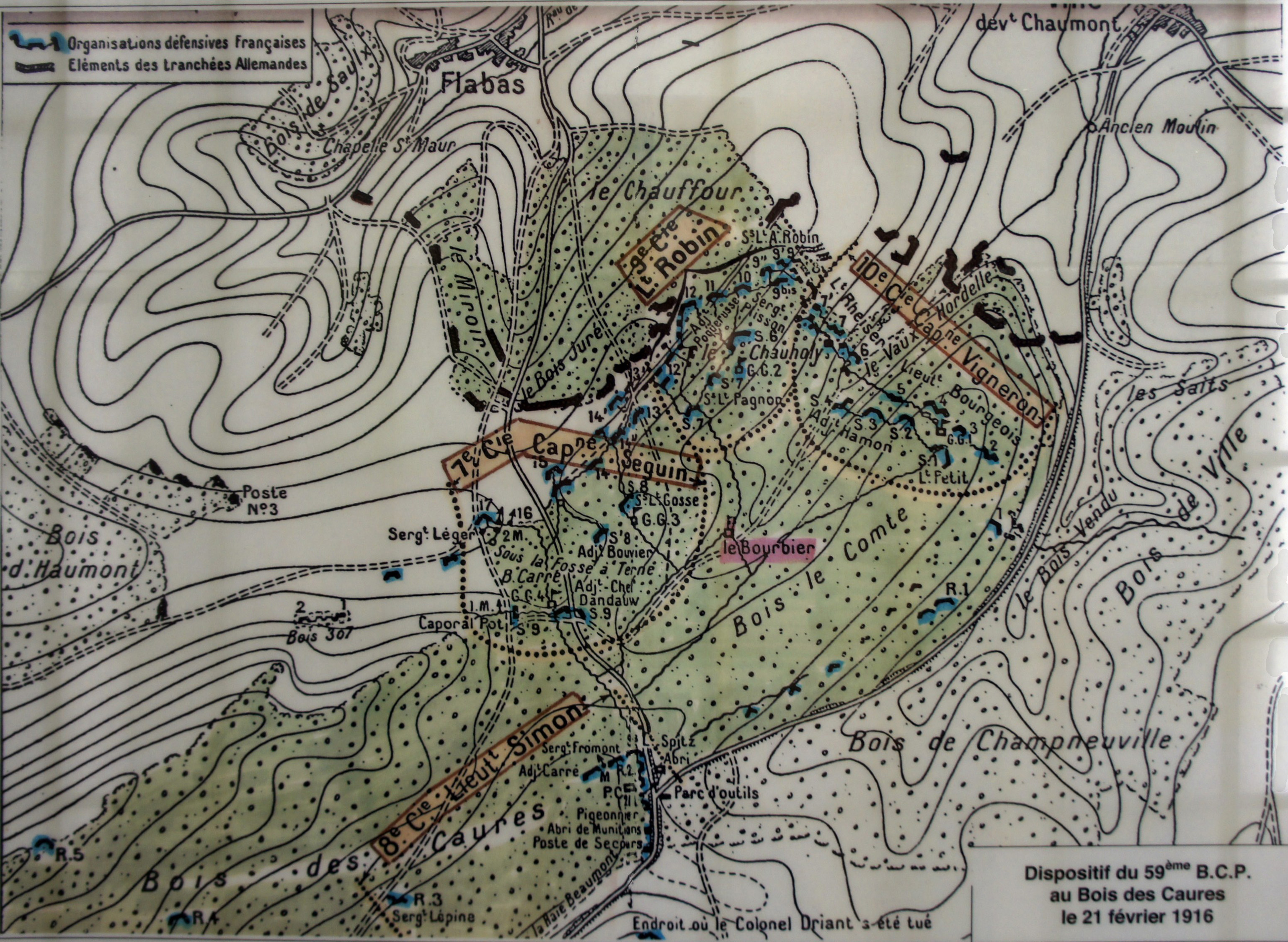 Position au Bois des Caures de Driant . Autorisation des Amis du Musée Emile Driant .